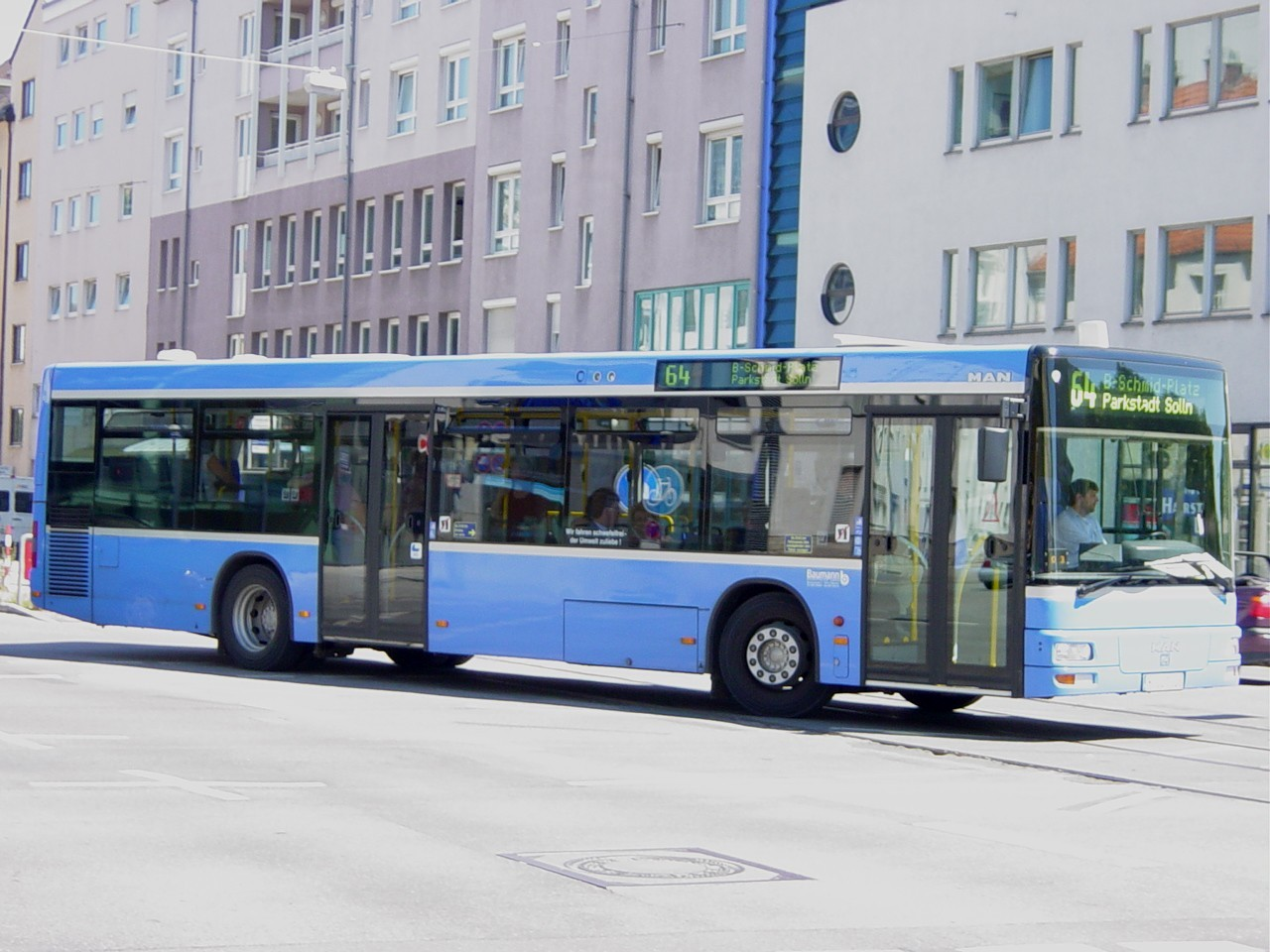 Dieses Bild zeigt einen MAN NL 263, selbst fotografiert, Lizenz: Public.